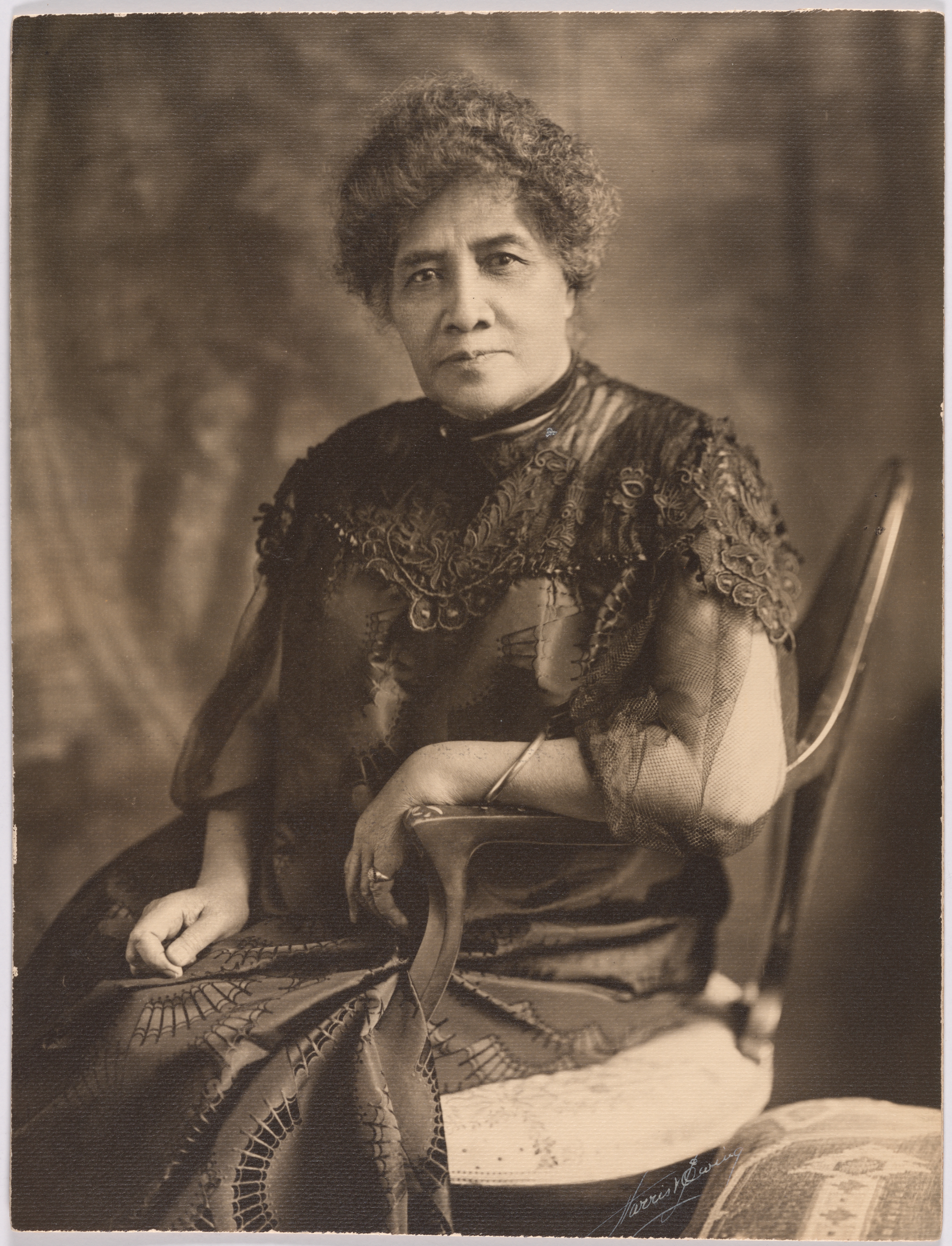 Liliuokalani